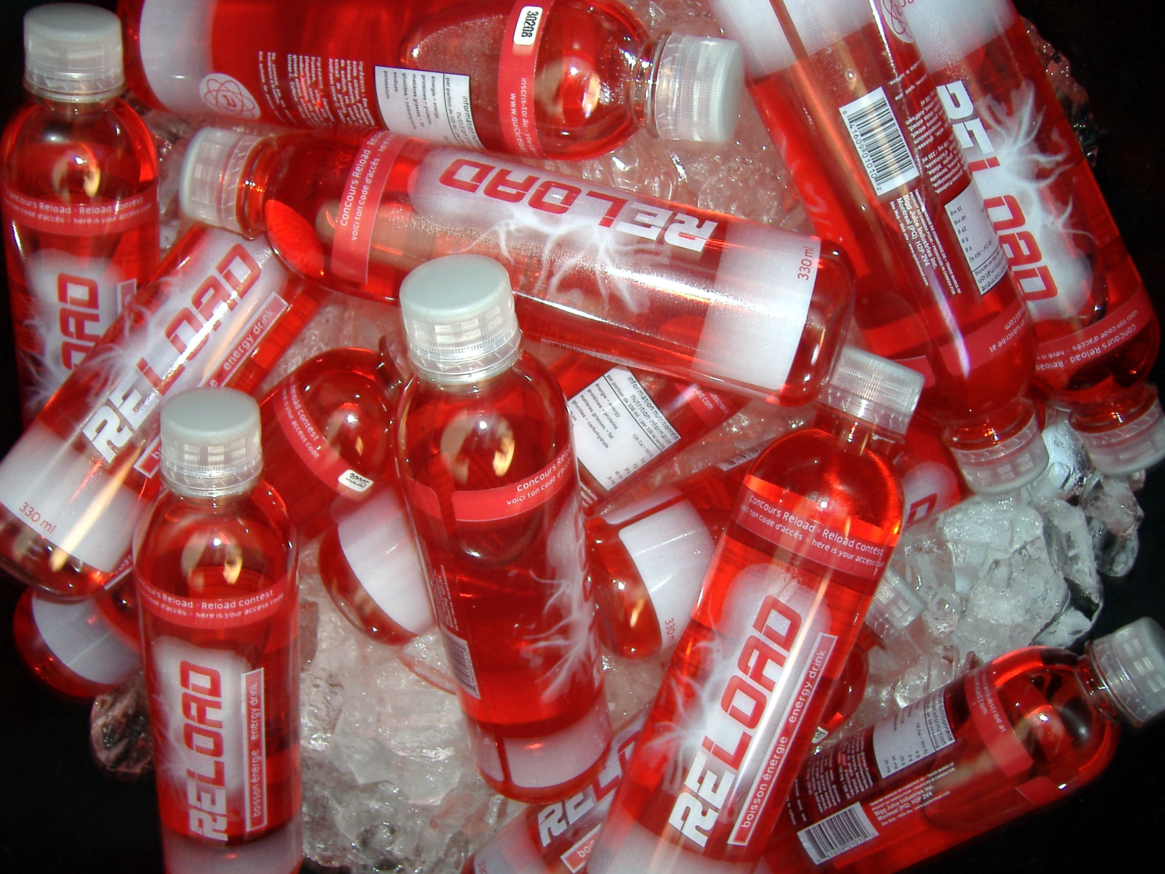 Some Reload -energy drink bottles.